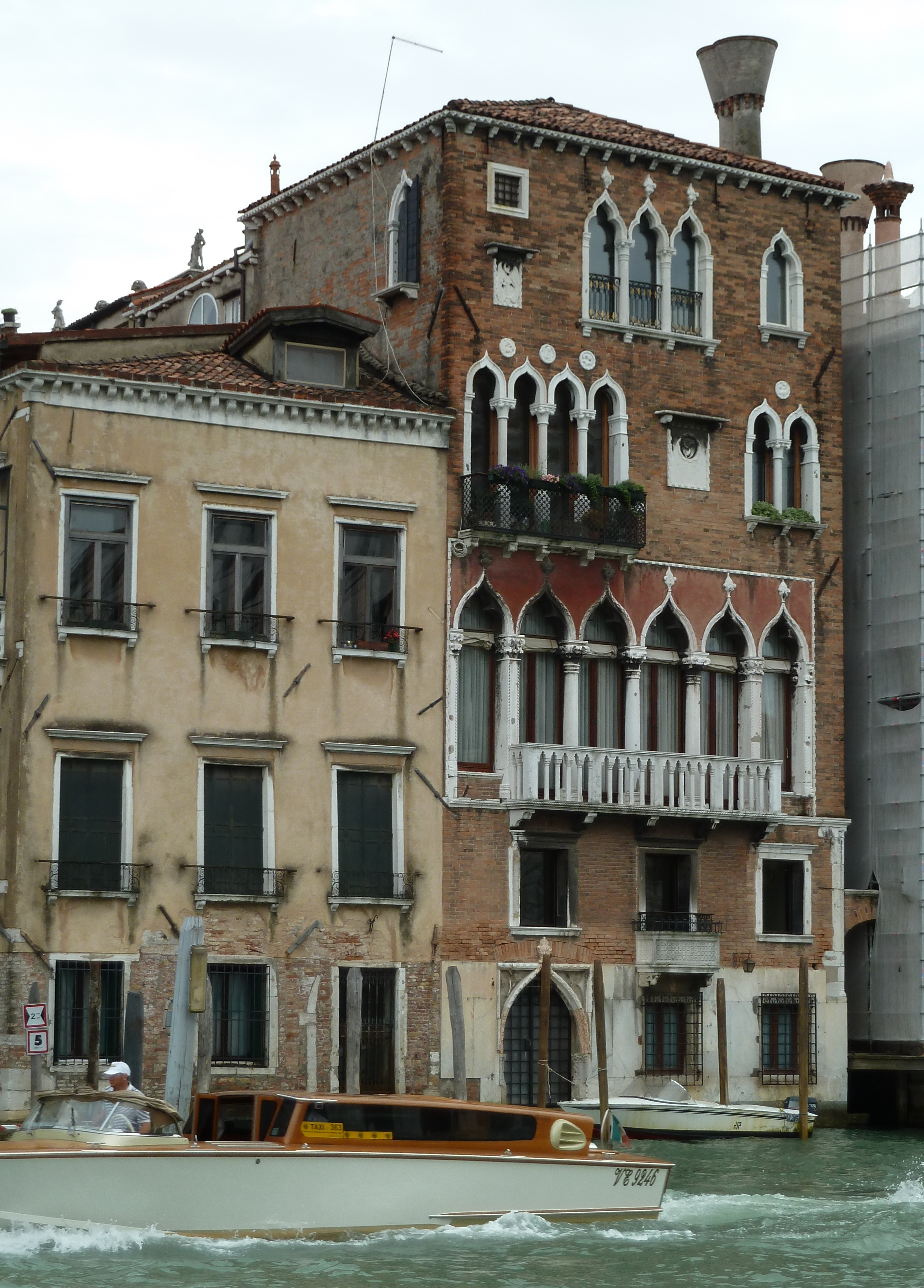 Palazzo Barbaro Wolkoff (Venice)